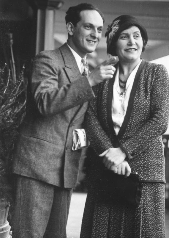 Zurück von seiner Amerika-Turnee ! Kammersängerin Maria Olszewska und der bekannte Schauspieler und Filmdarsteller Joseph Schildkraut kehrten von einer erfolgreichen Amerika-Turnee an Bord des Dampfers New York nach Deutschland zurück.